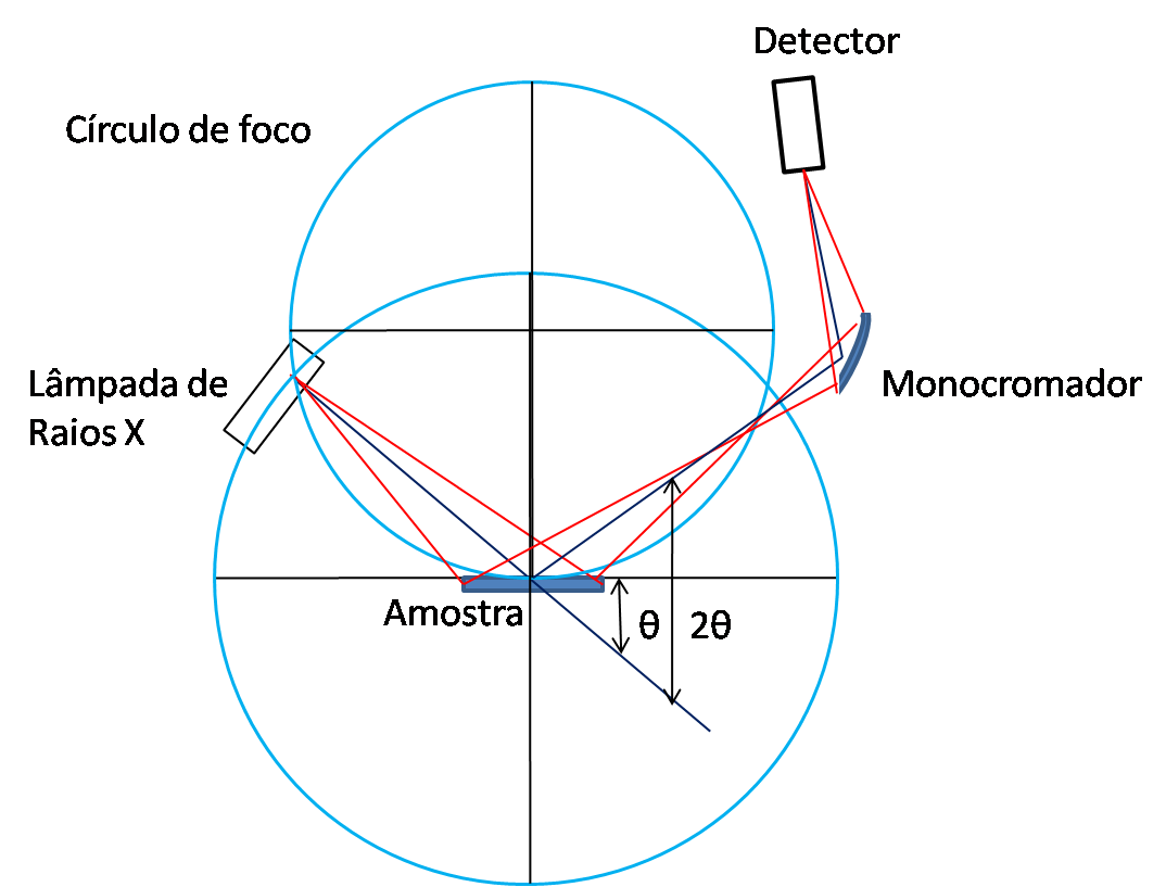 Detector 1